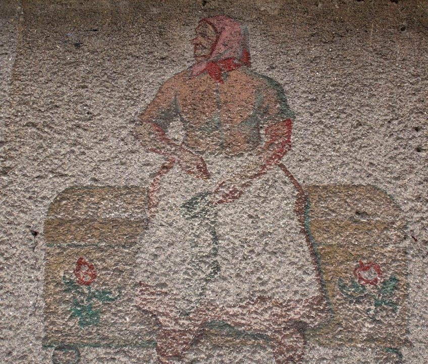 Jeden z fresków Maxa Sternagela na fasadzie dawnego banku w Jedlinie-Zdrój (1958) Fresko an Vorderfront Kreissparkasse Bad Charlottenbrunn (photo: 1958)